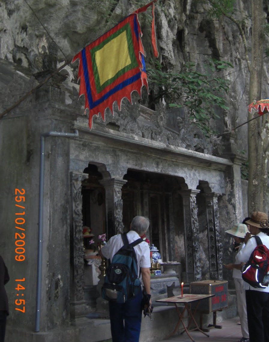 Đền Trần thờ tướng Trần Quý Minh thuộc Đời Hùng Vương thứ 18, Khu du lịch Tràng An, Ninh Bình